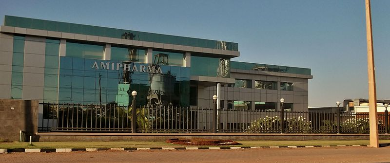 Amipharma laboratories For Pharmaceuticals - Khartoum Bahari - Sudan